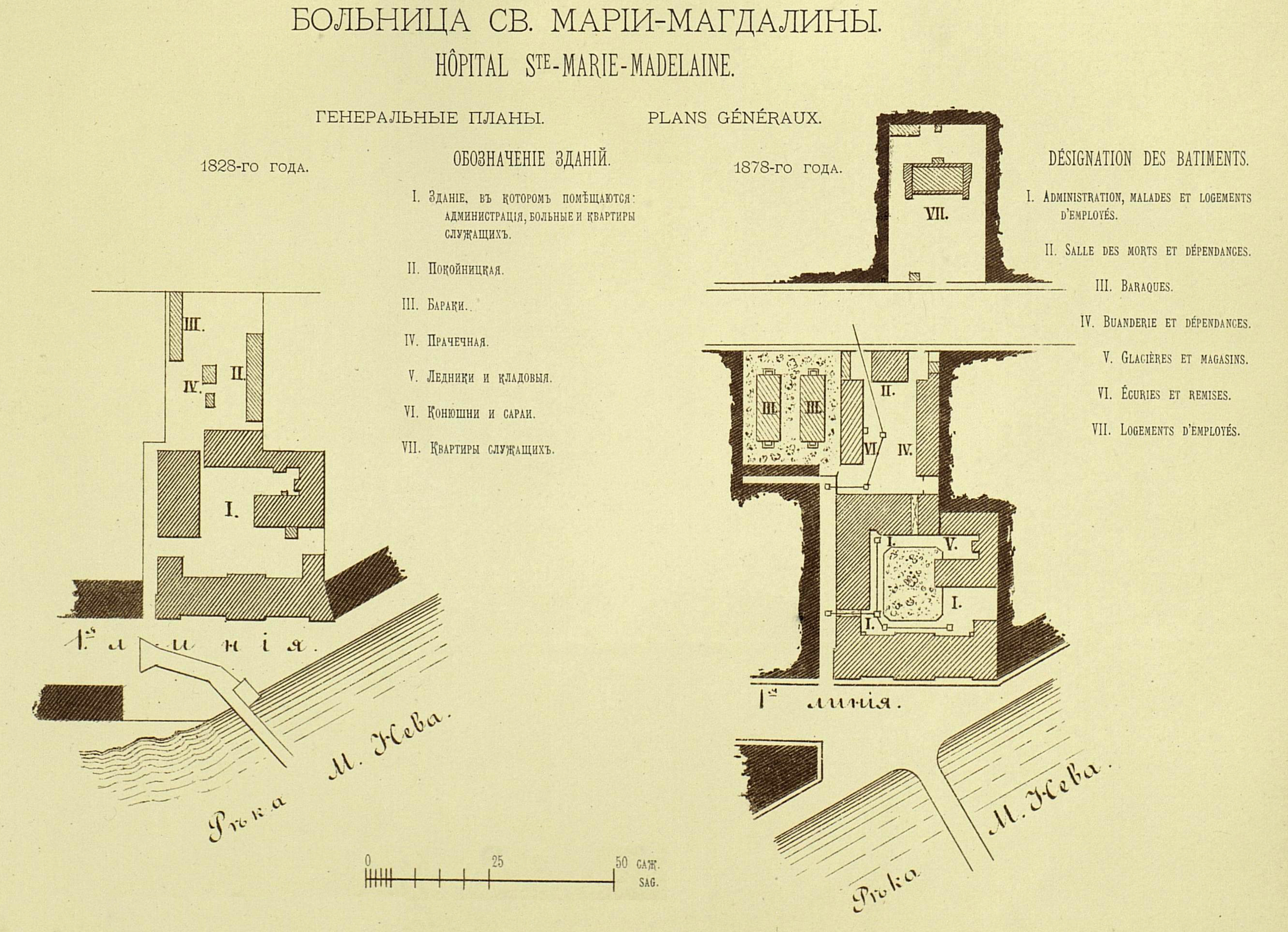 Больница Марии Магдалины, общий план в 19-м веке